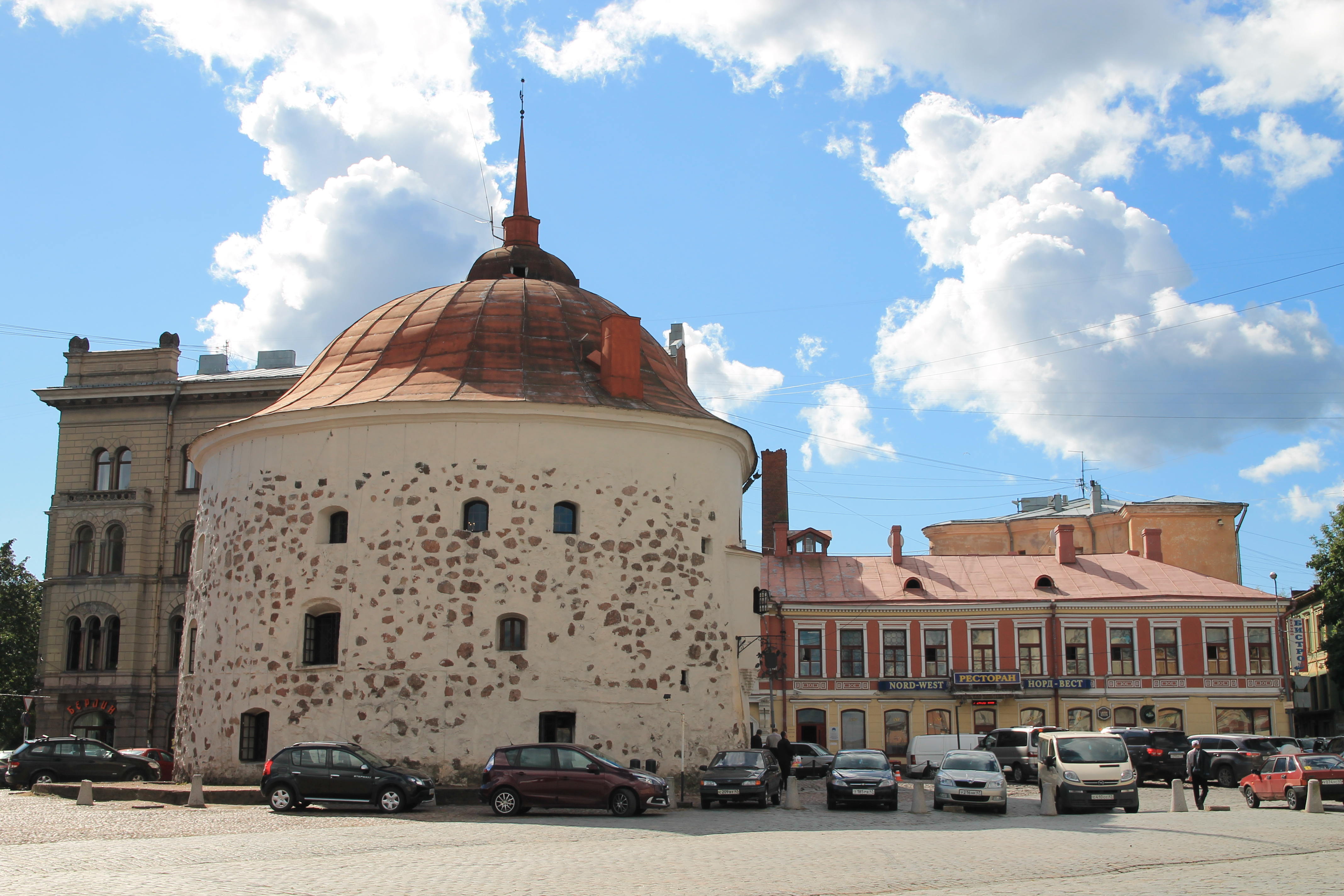 Воротный комплекс Карьяпорт / Круглая башня: Рыночная площадь, Выборг, Выборгский район, Ленинградская область